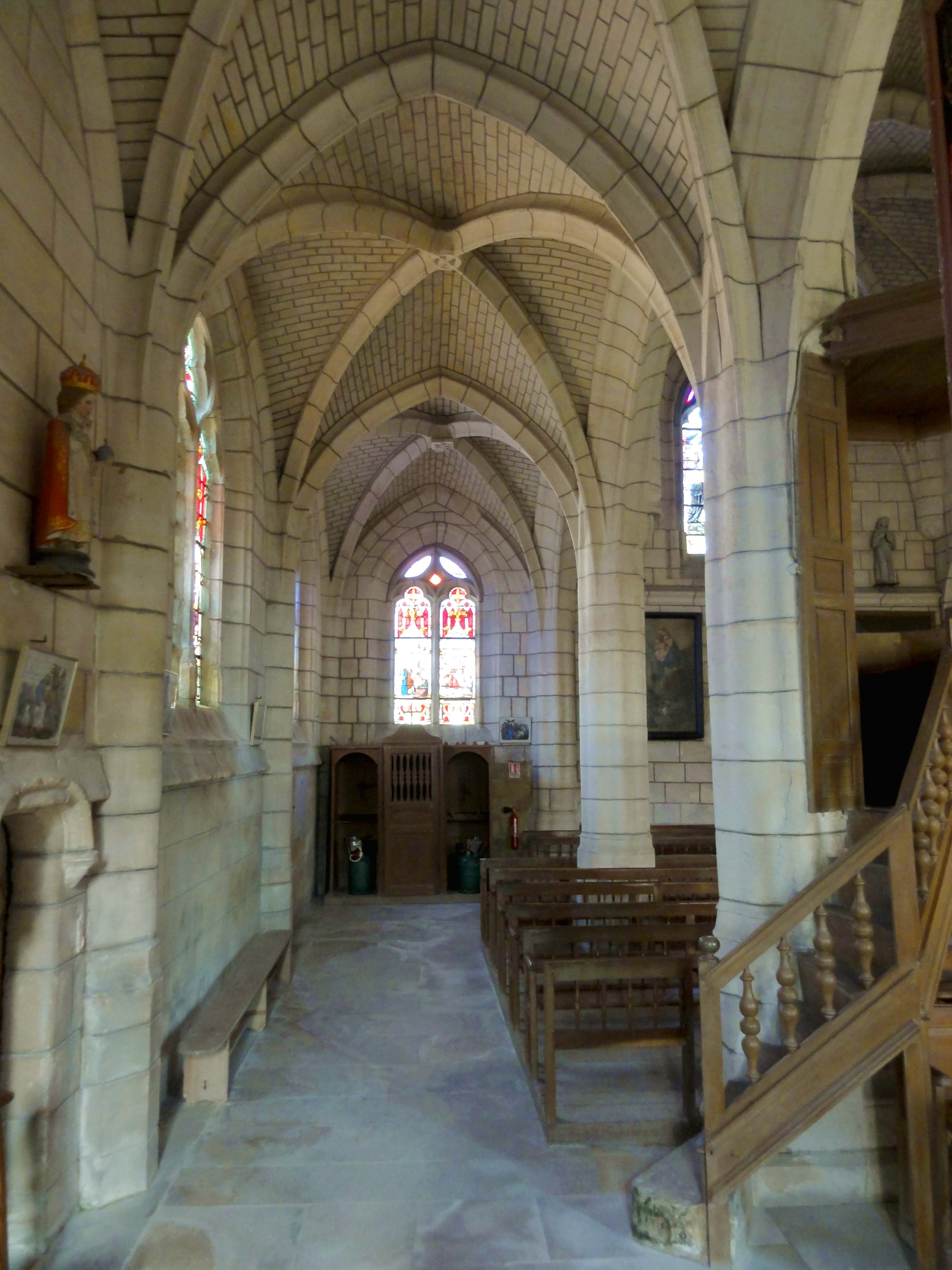 Intérieur de l'église (voir titre).